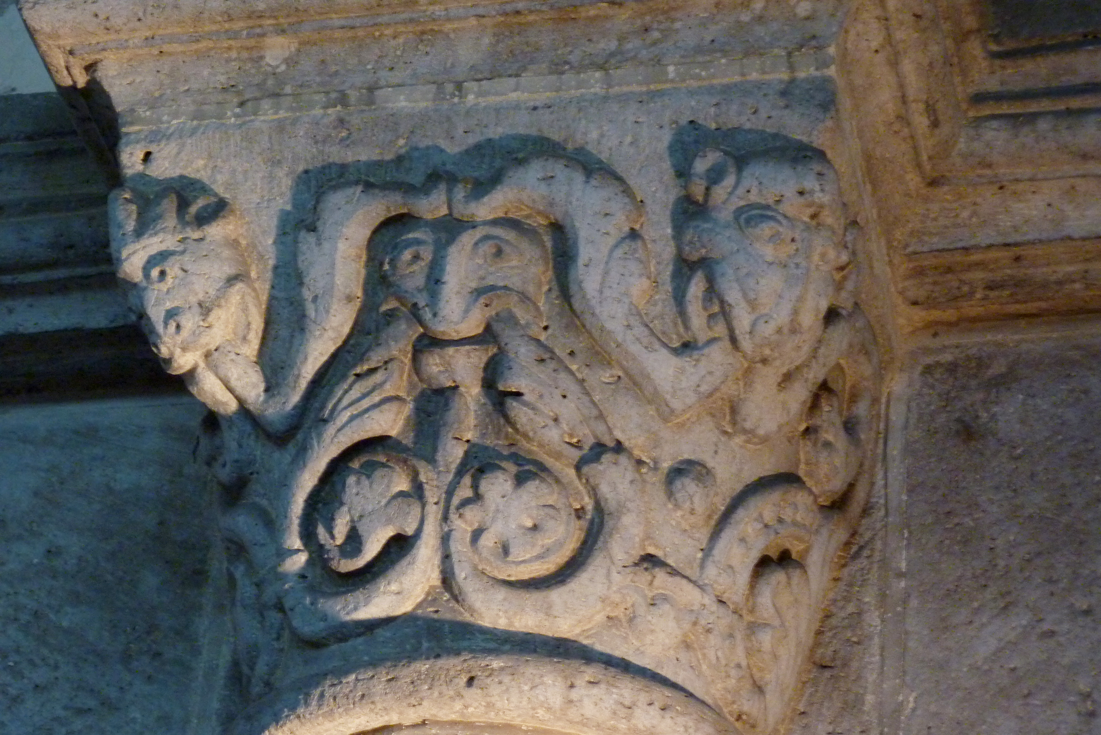 Katholische Pfarrkirche Notre-Dame-du-Fort in Étampes im Département Essonne in der Region Île-de-France (Frankreich), Kapitell Object location48° 26′ 05.89″ N, 2° 09′ 51.01″ E